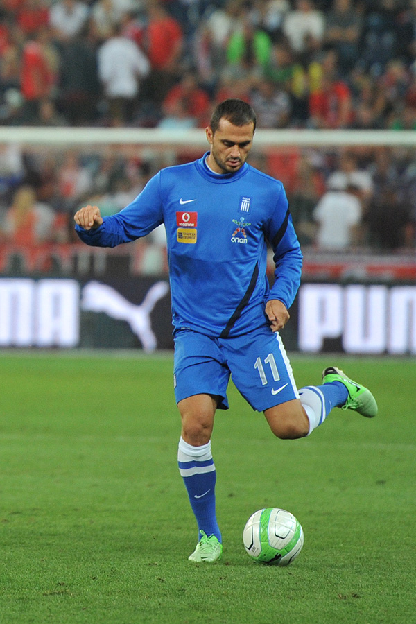 Freundschaftliches Länderspiel Österreich - Griechenland am 14. August 2013 in Salzburg: Loukas Vyntra